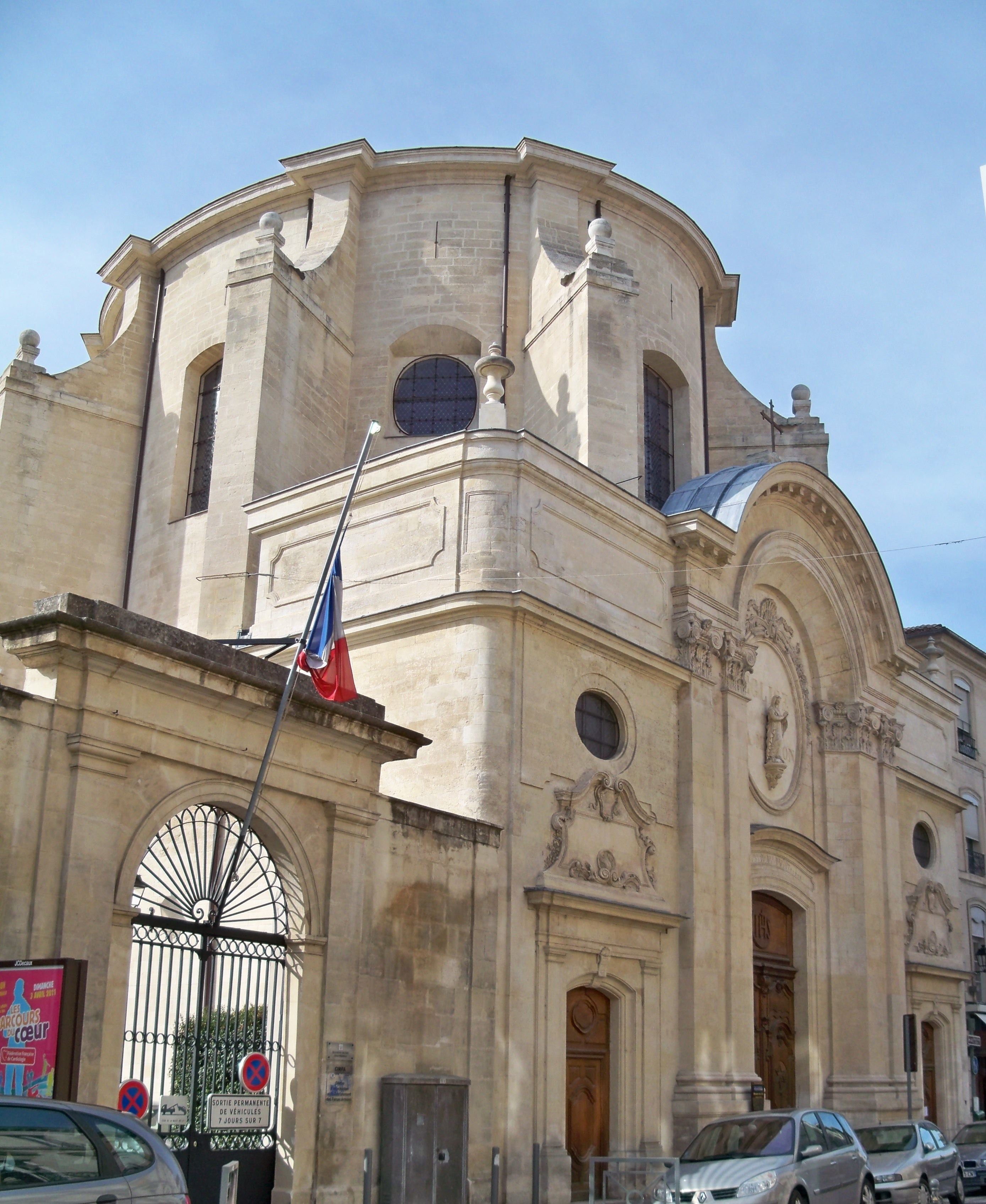 Chapelle de l'Oratoire à Avignon (84) .